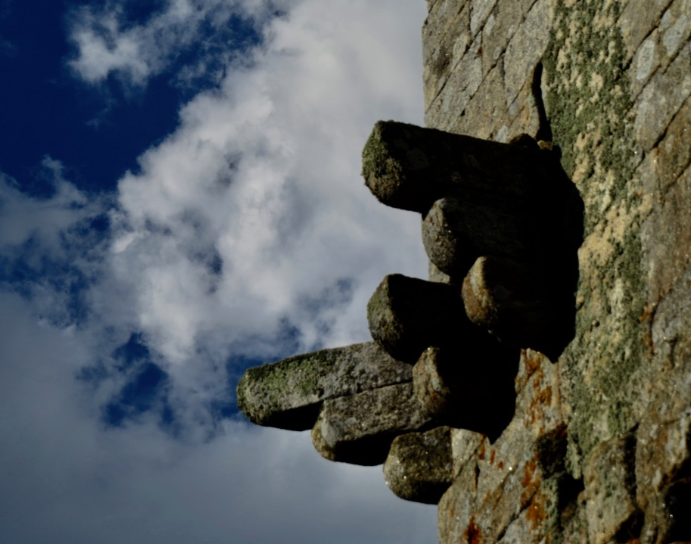 son muchos los detalles a apreciar...